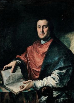 Giuseppe Antonio Ghedini, Ritratto di Girolamo Baruffaldi, 1736, olio su tela, cm 117x85, Pinacoteca Nazionale di Ferrara